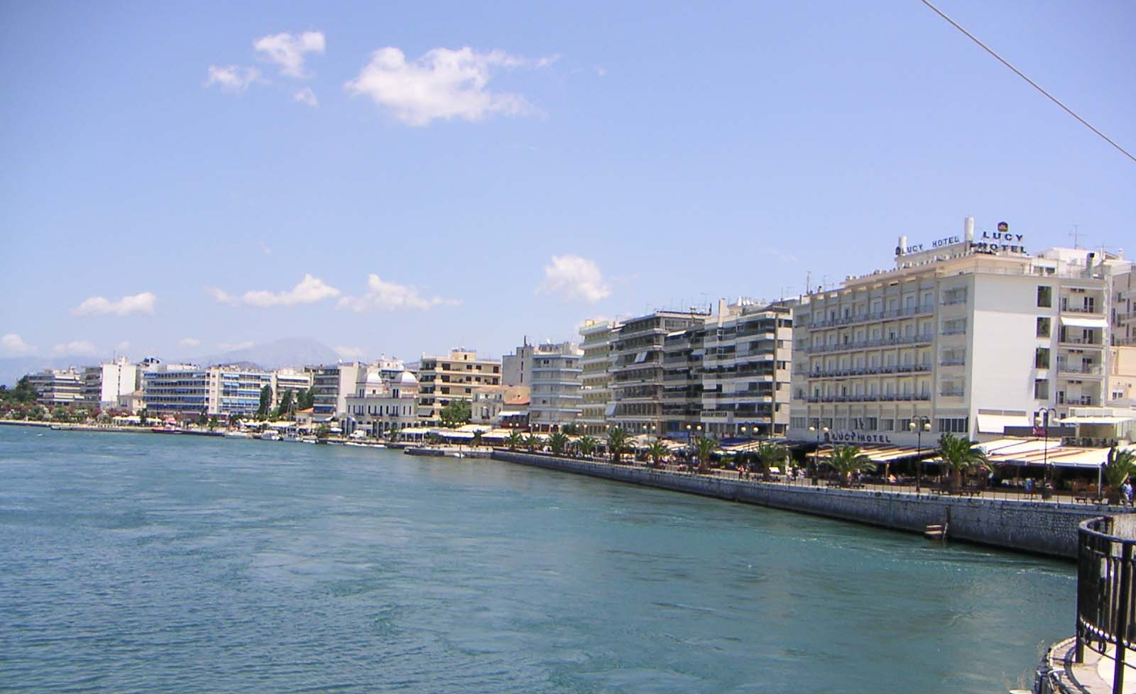 Die Strandpromenade Chalkidas